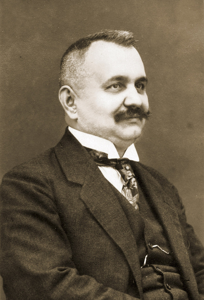 Josef Vaňásek (1877 - 1938), Český kriminalista.